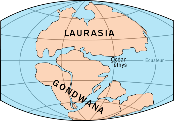 Les continents Gondwana et Laurasia au Trias, et la Théthys